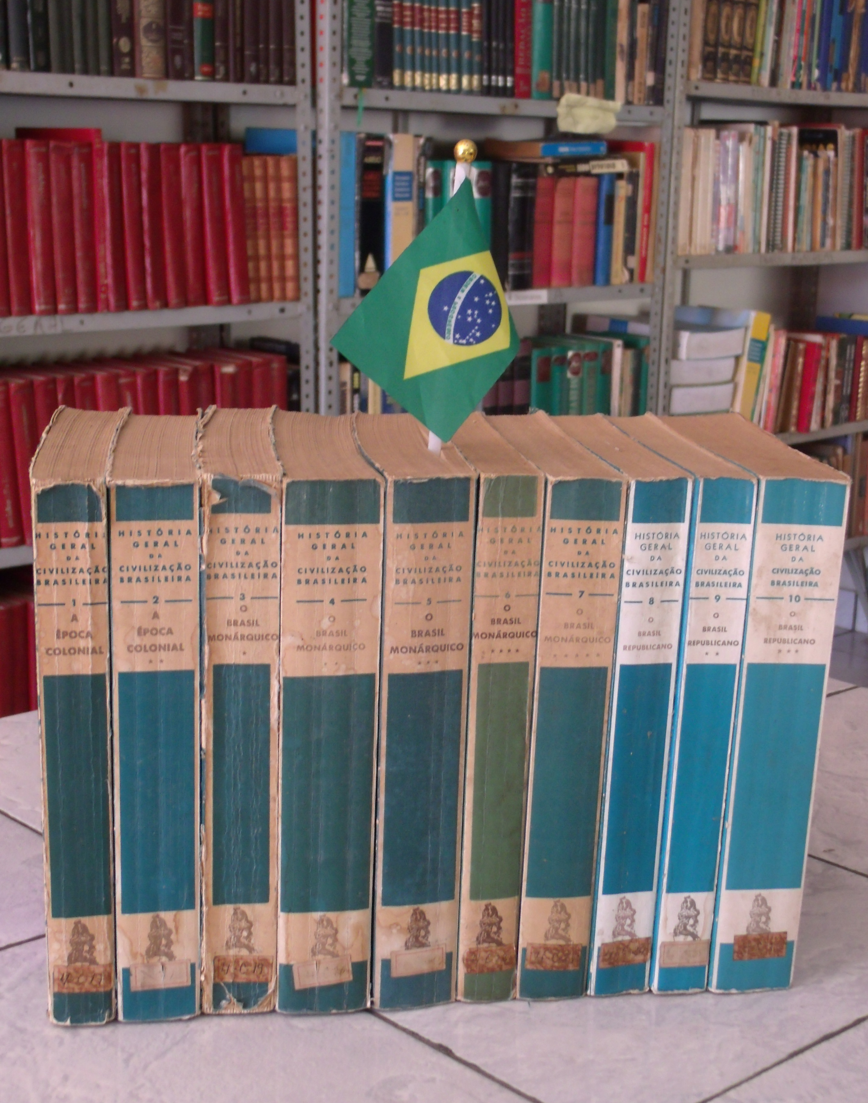 10 volumes da coleção enciclopédica História da Civilização Brasileira em exposição em uma biblioteca pública.